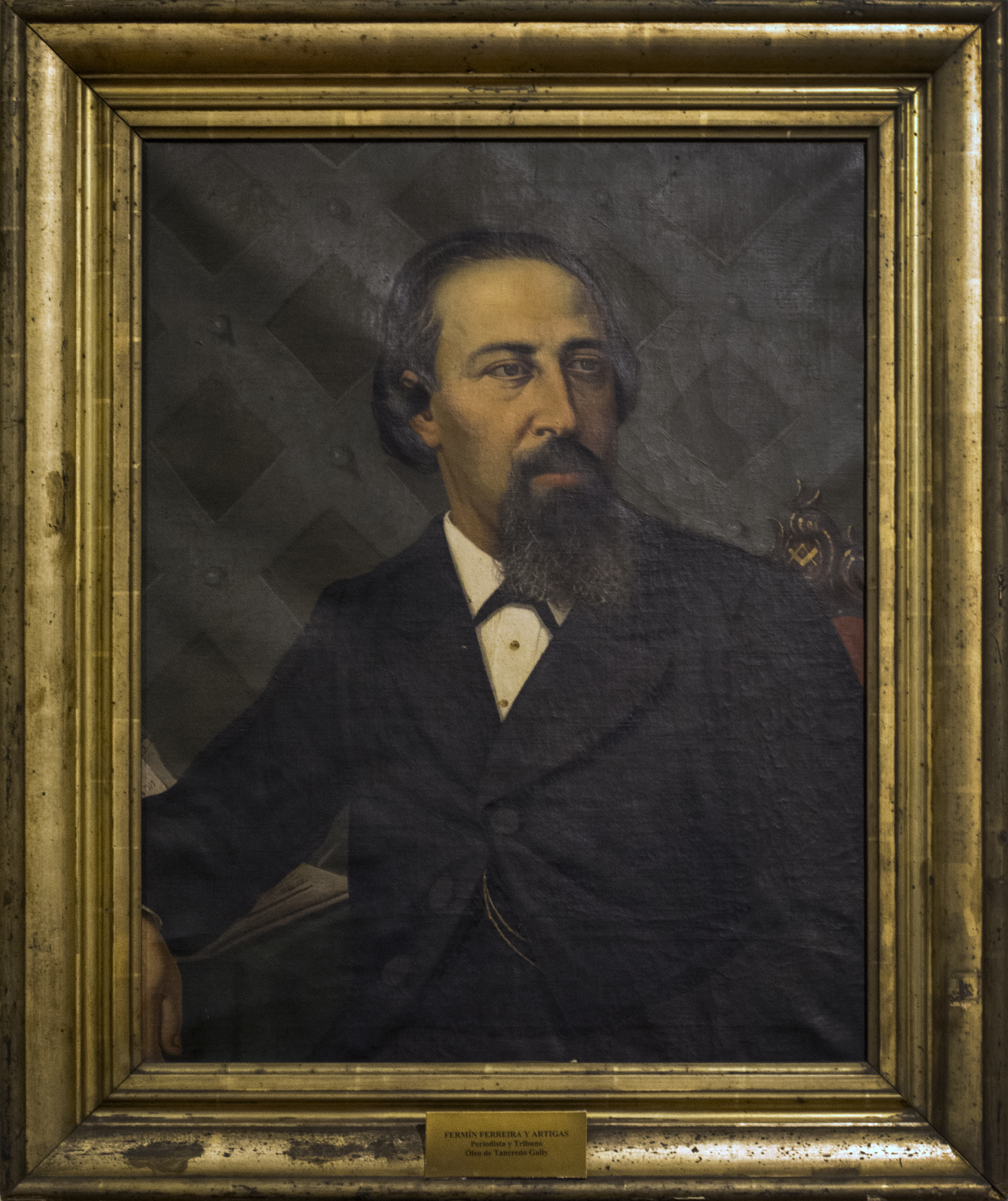 Archivo provisto por el Museo Histórico Nacional de Uruguay en el marco de un proyecto GLAM entre esa institución y Wikimedia Uruguay.